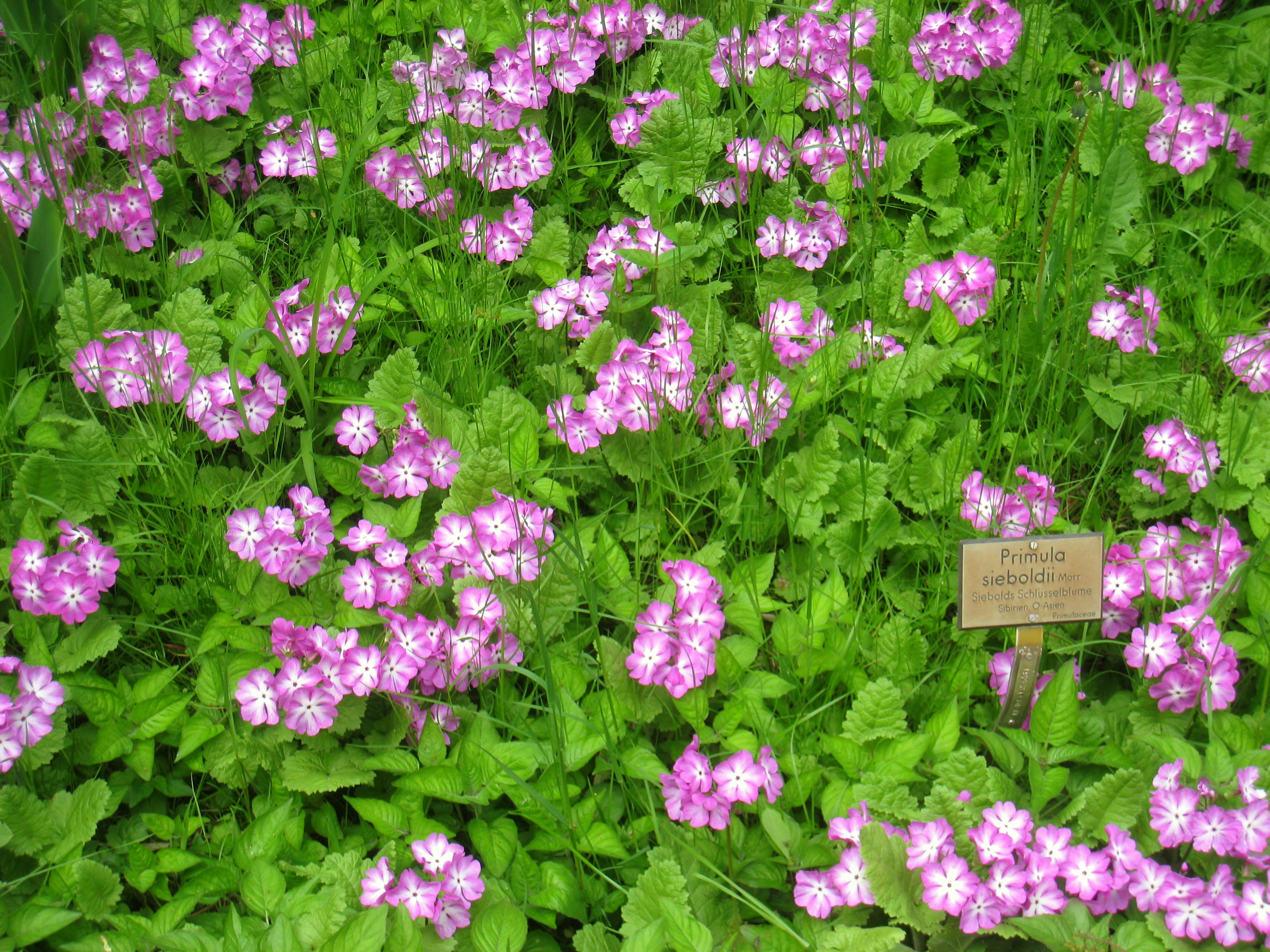 Primula sieboldii specimen in the Botanischer Garten, Berlin-Dahlem (Berlin Botanical Garden), Berlin, Germany.